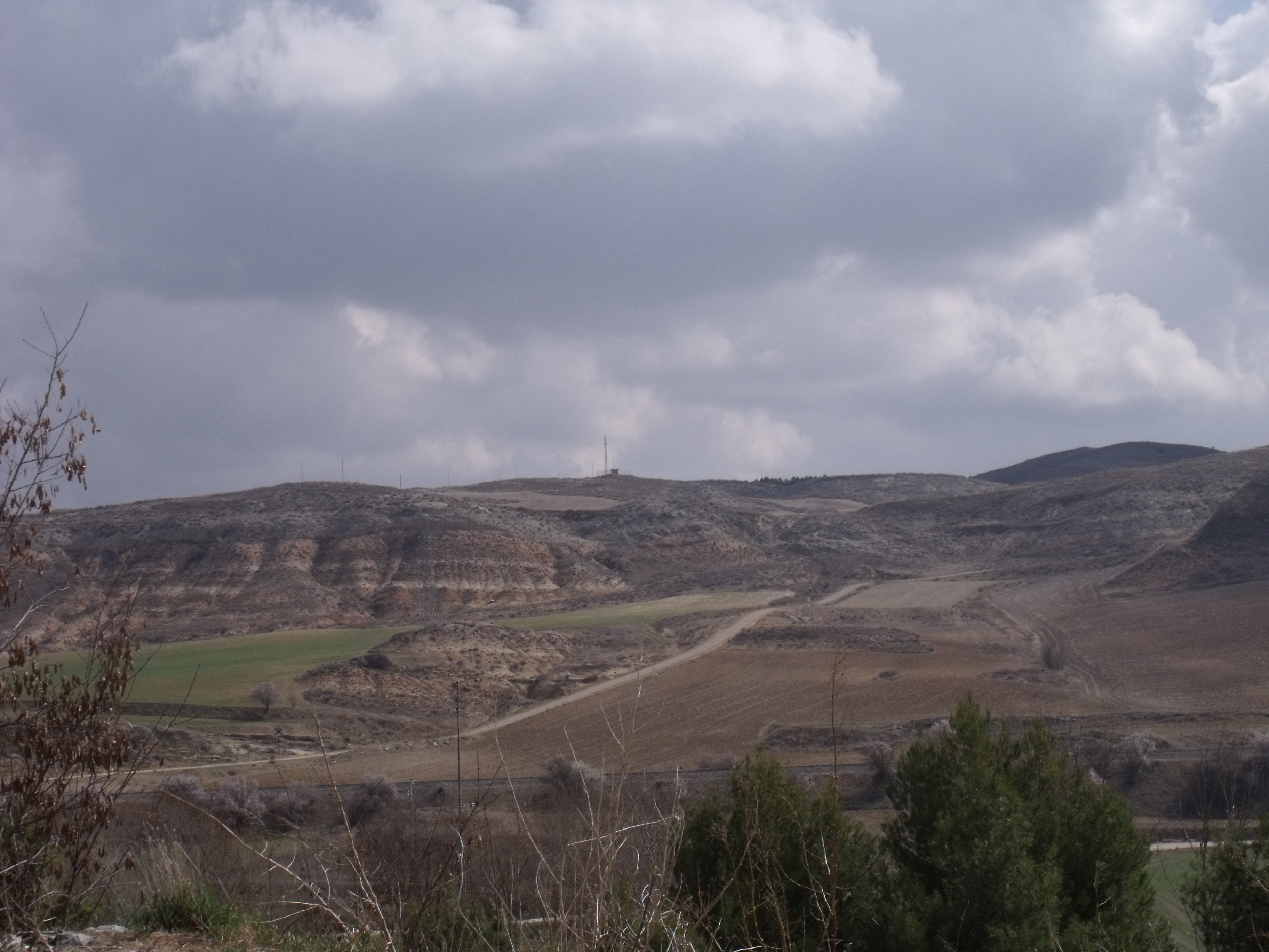 Vistas de los campos de Huete desde el convento de Jesús y María.